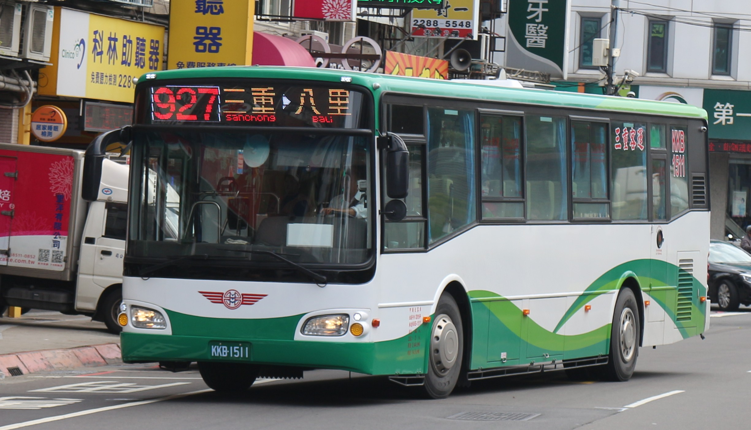 三重客運KKB-1511 927駕側